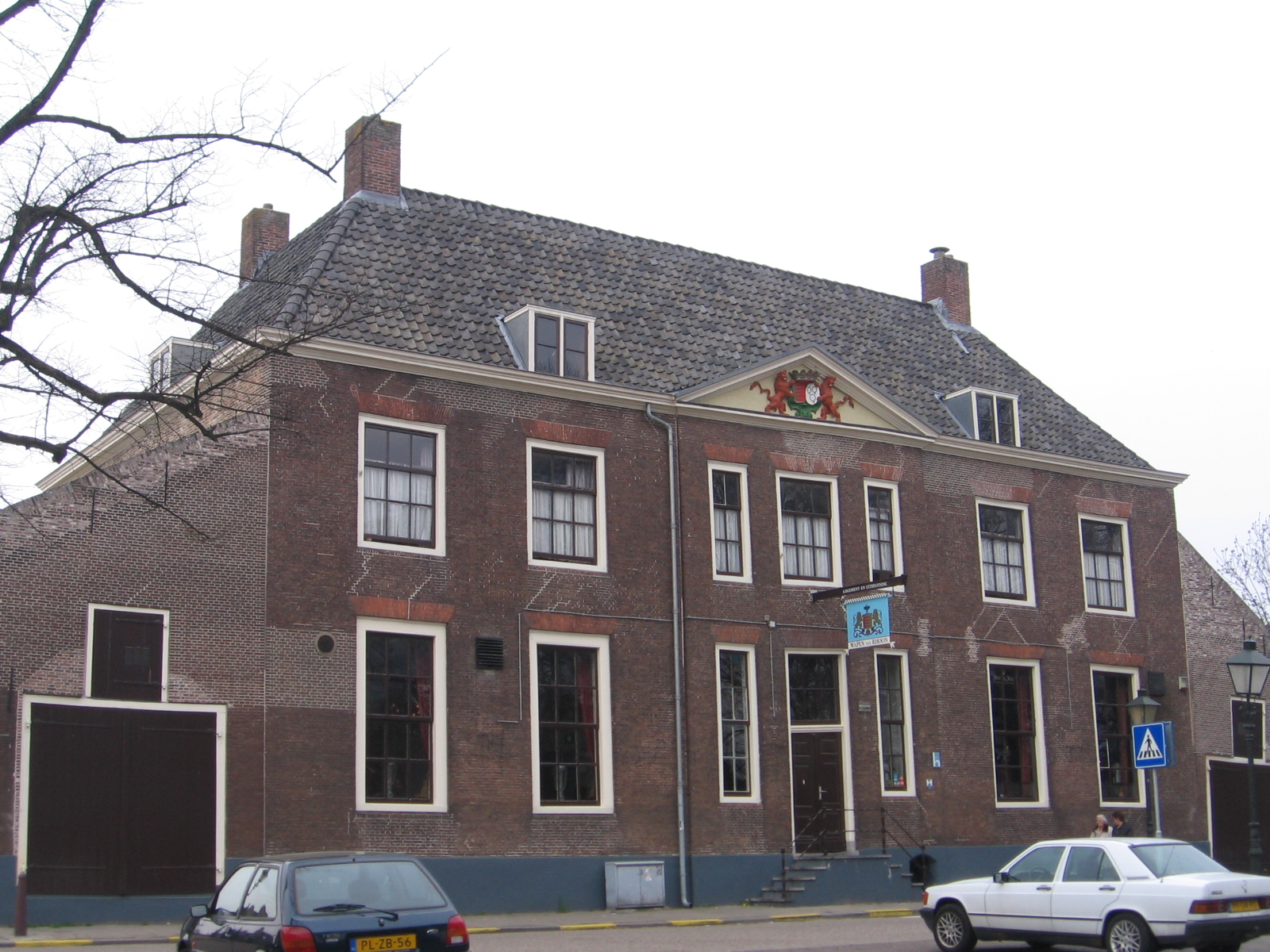 Rhoon, Albrandswaard